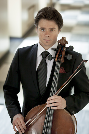 Kuva: Mika Kirsi